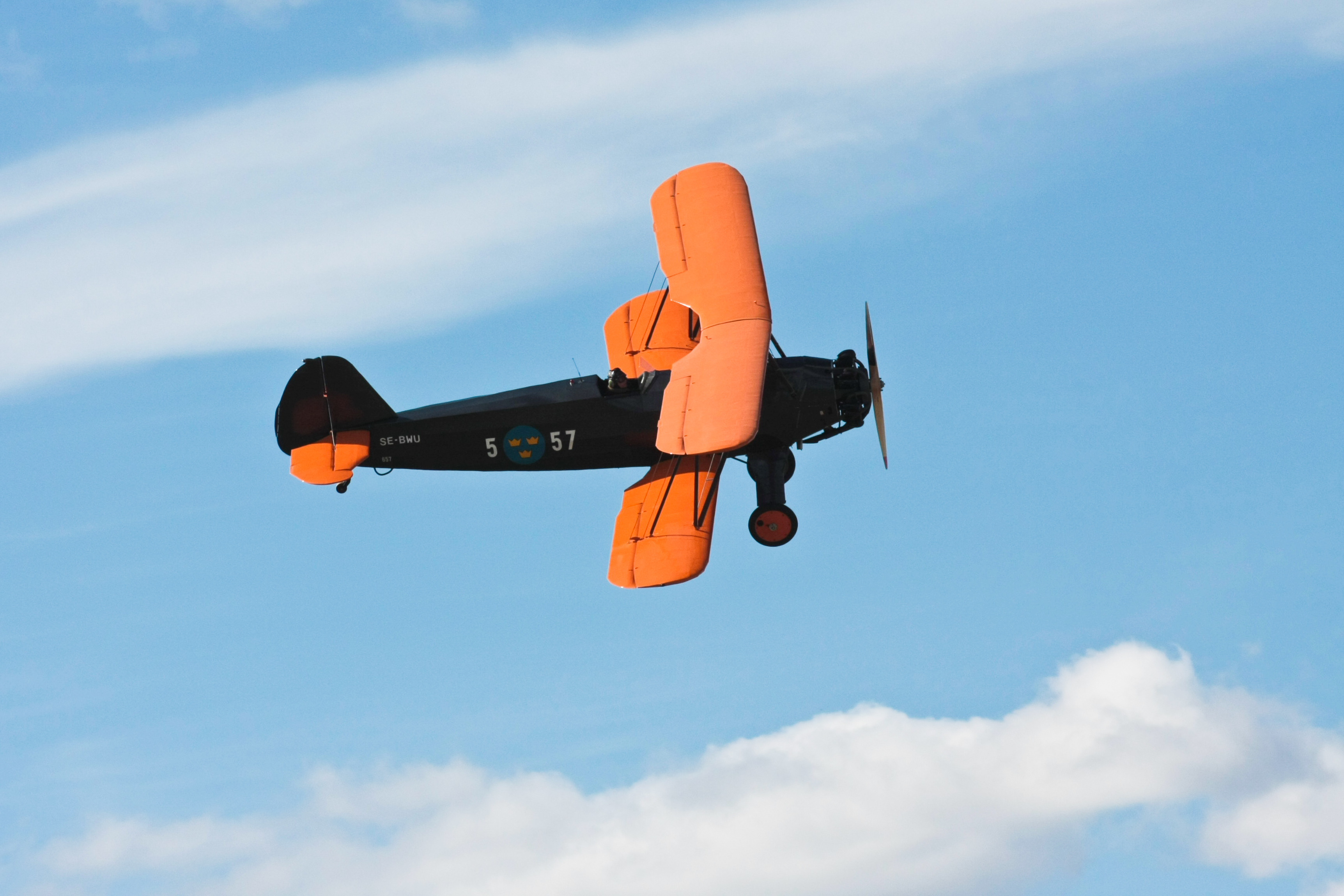 Håkan Dahlström Photography